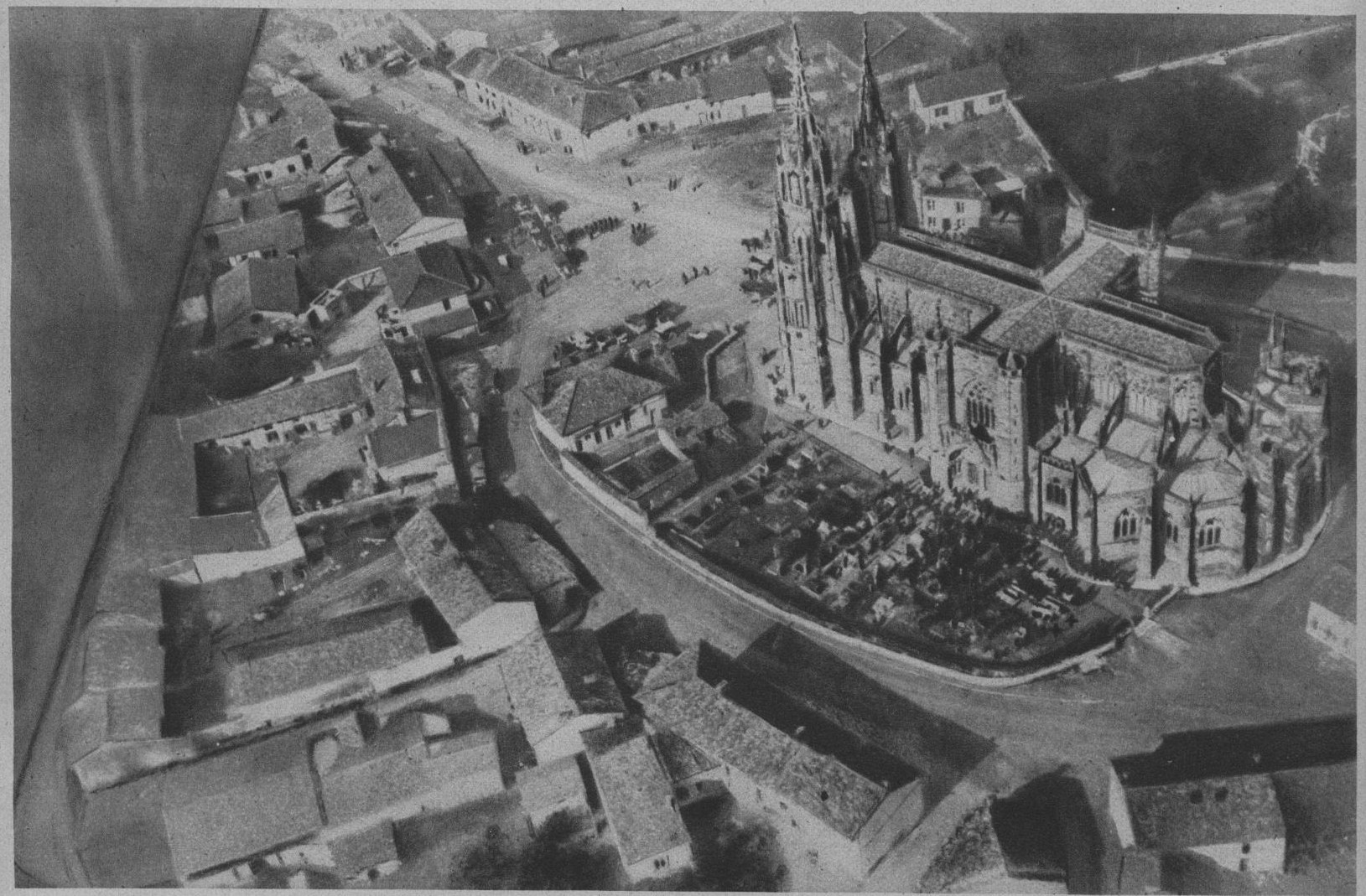 Photographie aérienne de la basilique notre dame de l'épine en 1915.